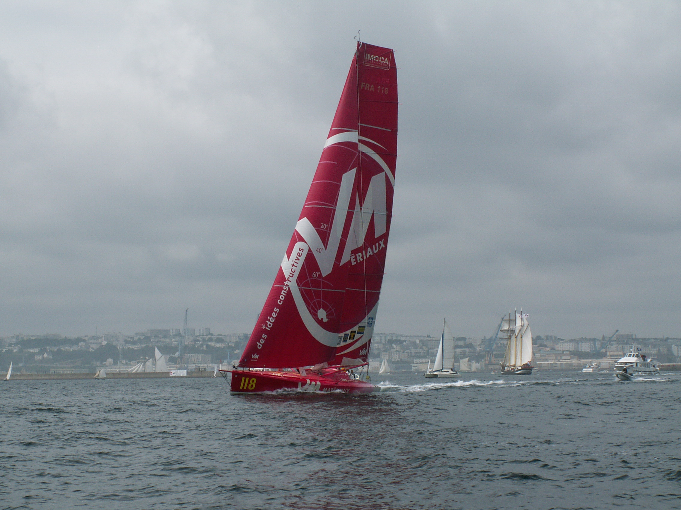 Brest 2008: Open60 (IMOCA) VM Matériaux